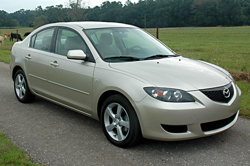 2006 US-spec Mazda3 i sedan